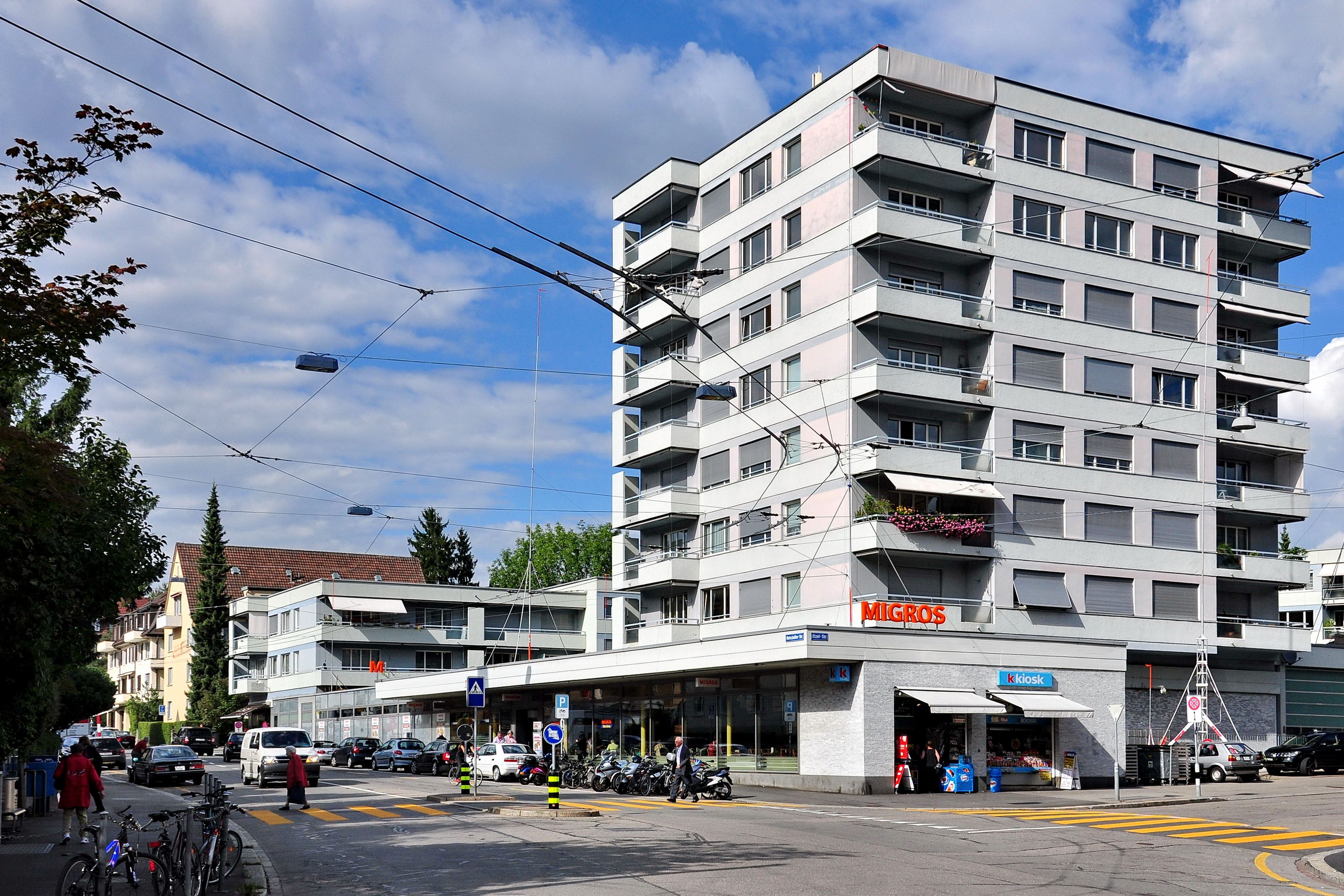 Mutschellenstrasse-Etzelstrasse, Morgental in Zürich-Wollishofen (Switzerland)